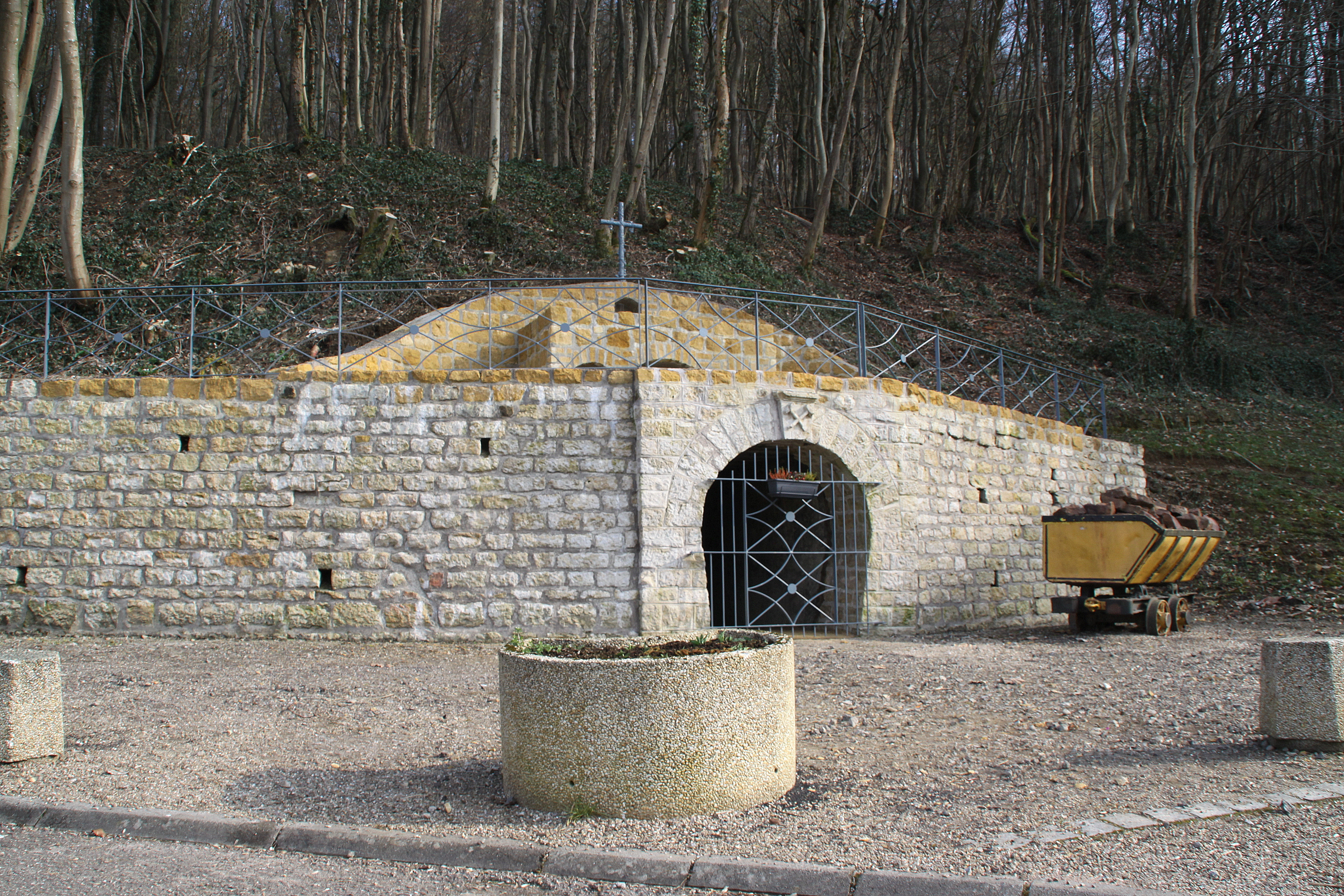 En Agank vun der Minière Ëtteng II